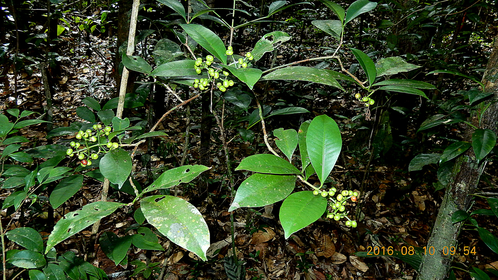 Ixora grandifolia Müll.Arg.